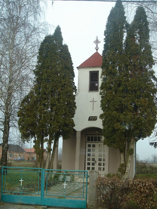 kapelica u Dulepskoj